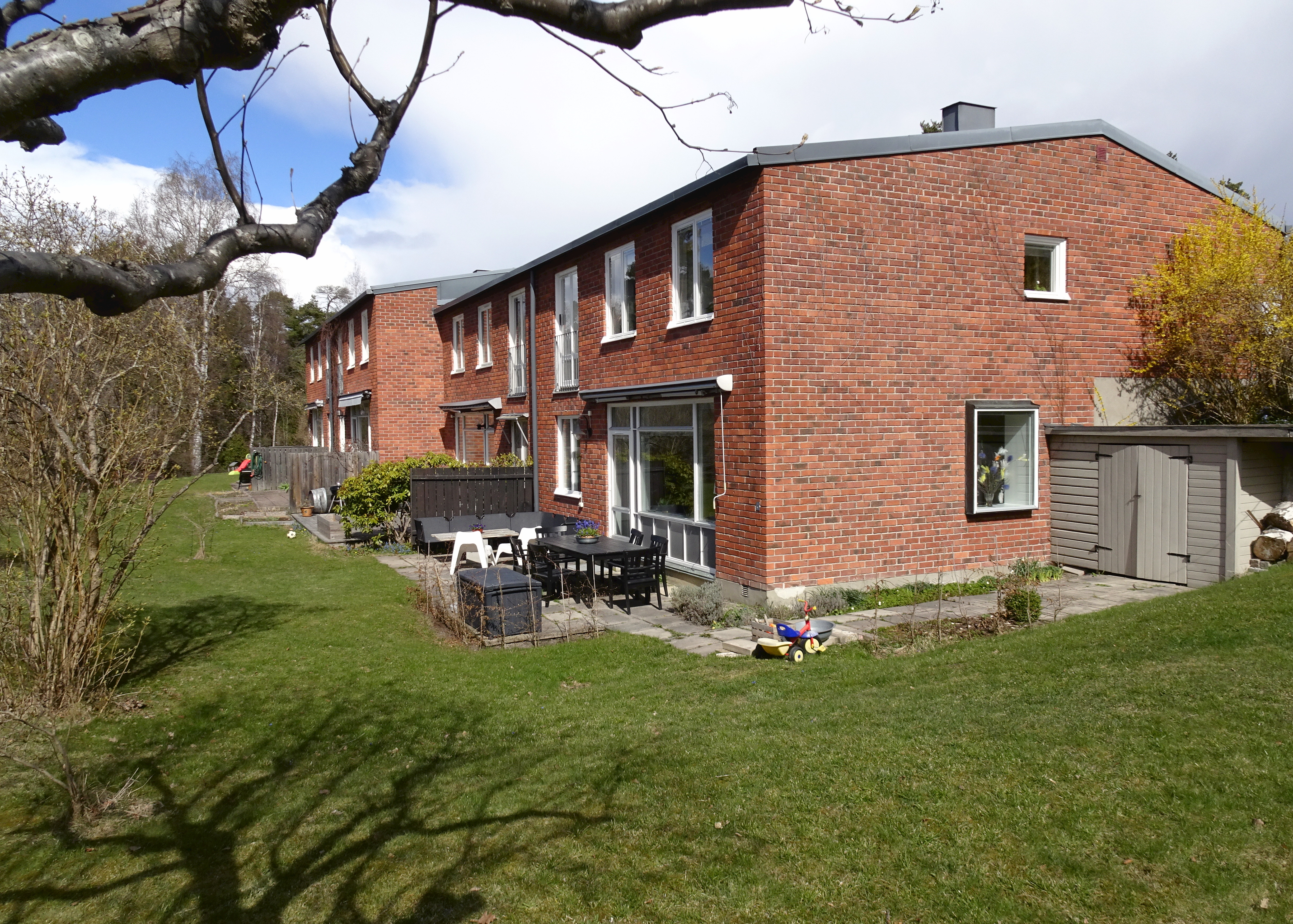 Radhus vid Järvsögränd 3-9, Vällingby, arkitekt Erik Wirén och Nils-Gunnar Nilsson. Nybyggnadsår 1956 - 1958